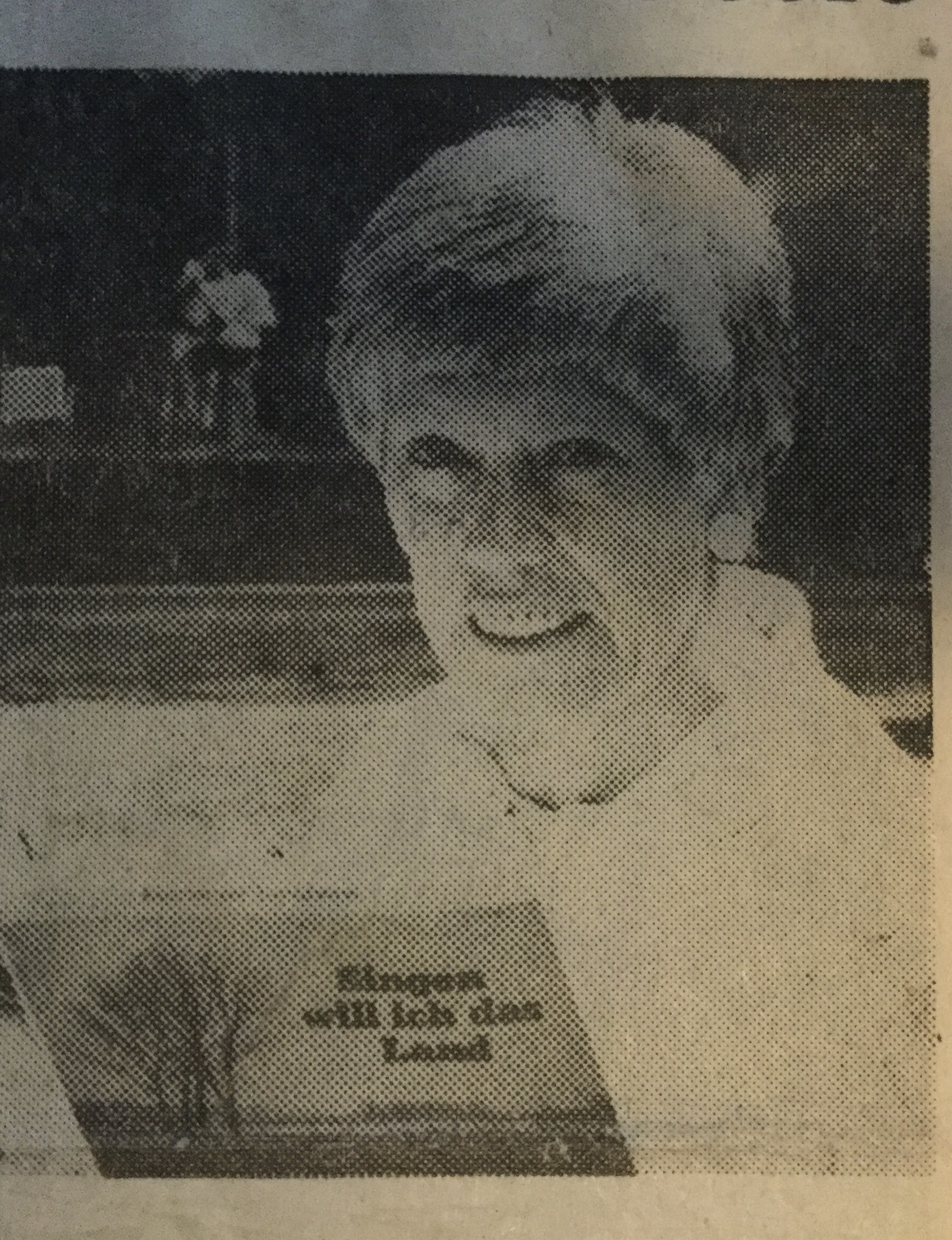 Die Lyrikerin Marianne Junghans, geb. 15. Mai 1923 in Krefeld